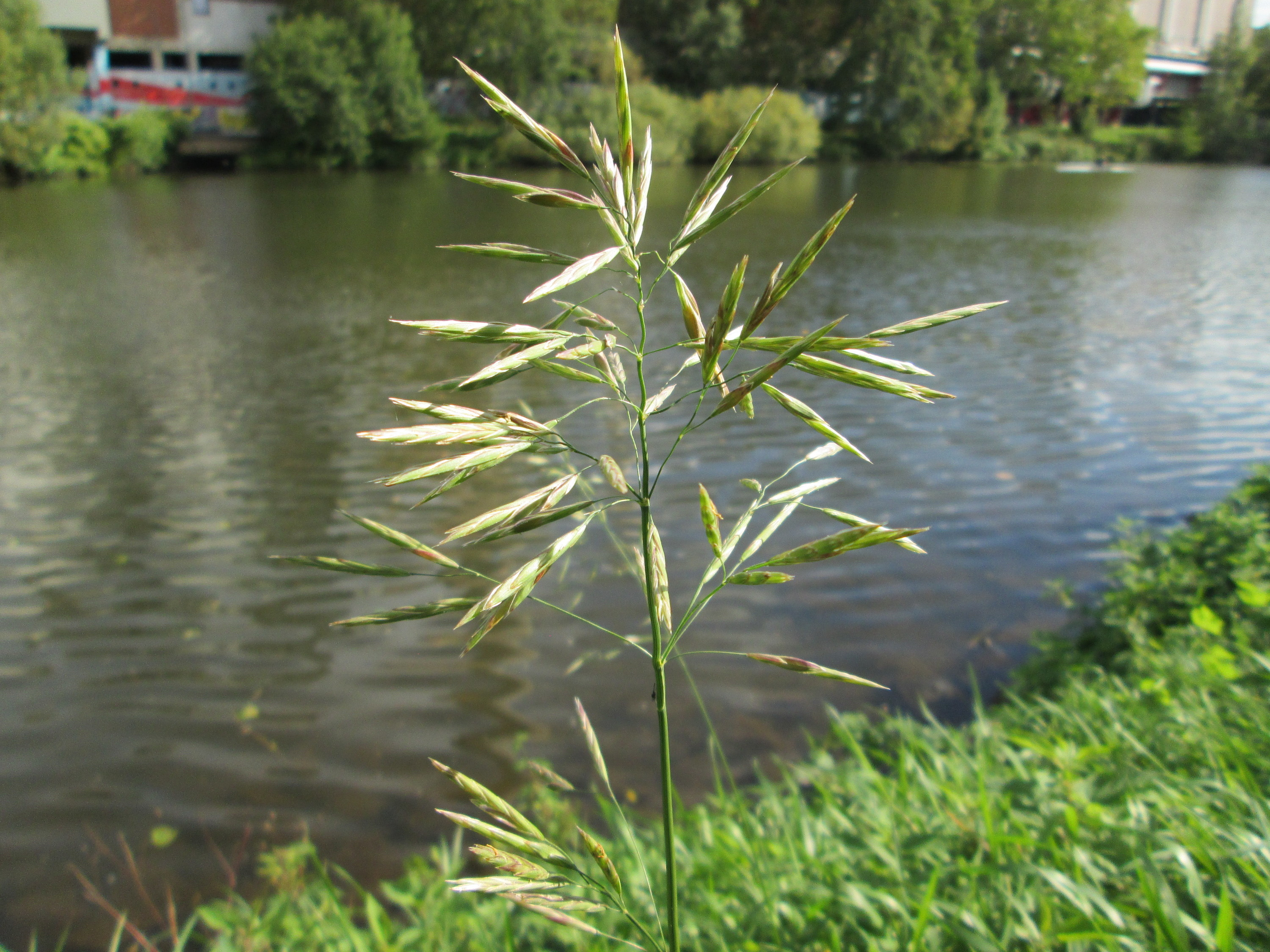 Wehrlose Trespe (Bromus inermis) an der Saar in Saarbrücken